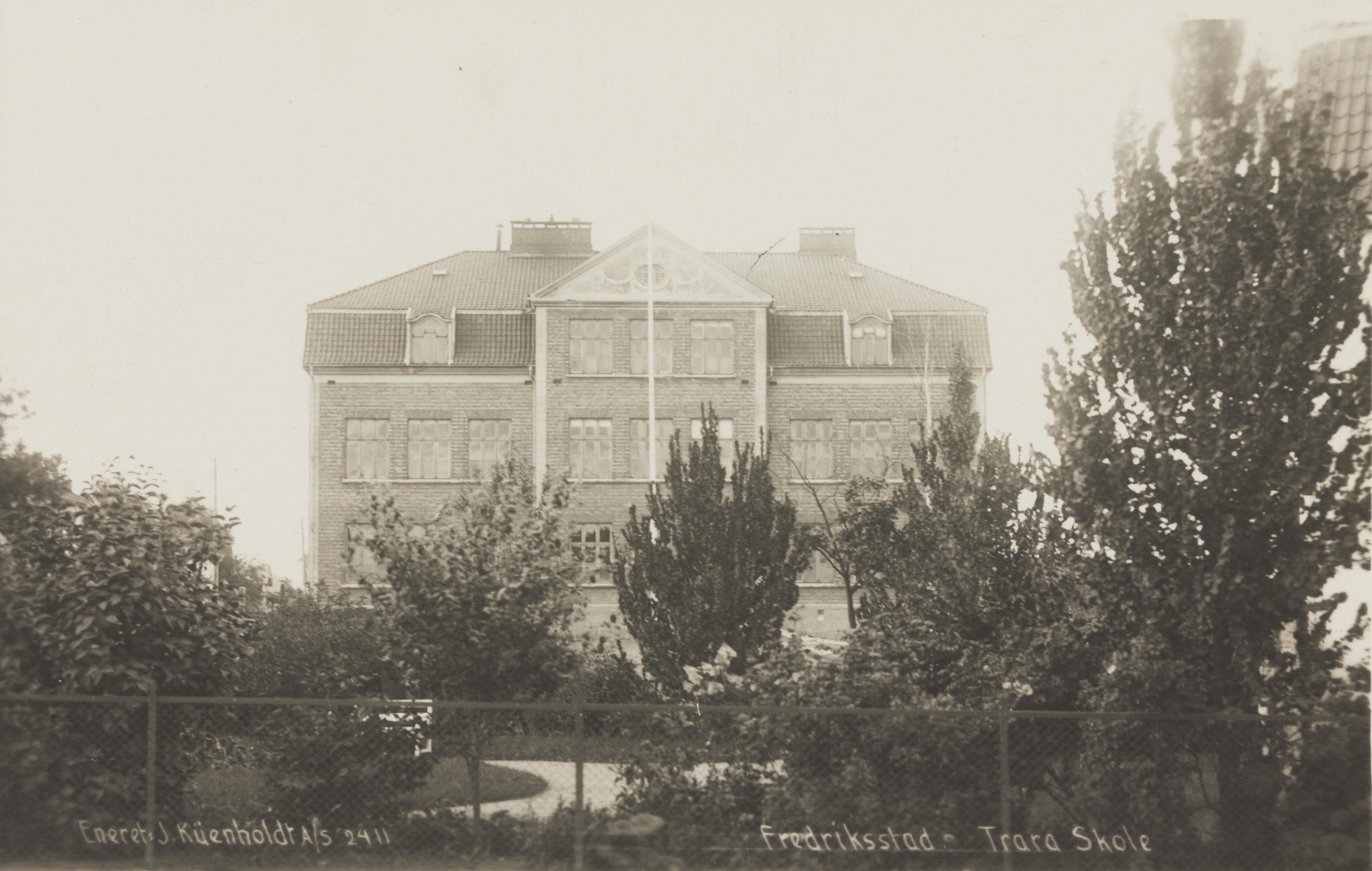 Bildet er hentet fra Nasjonalbibliotekets bildesamling